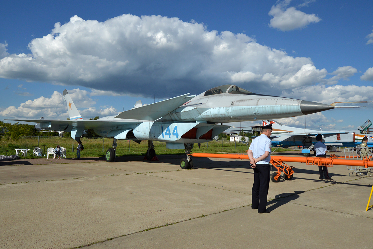 MIG Design Bureau, 144, Mikoyan-Gurevich MiG 1.44